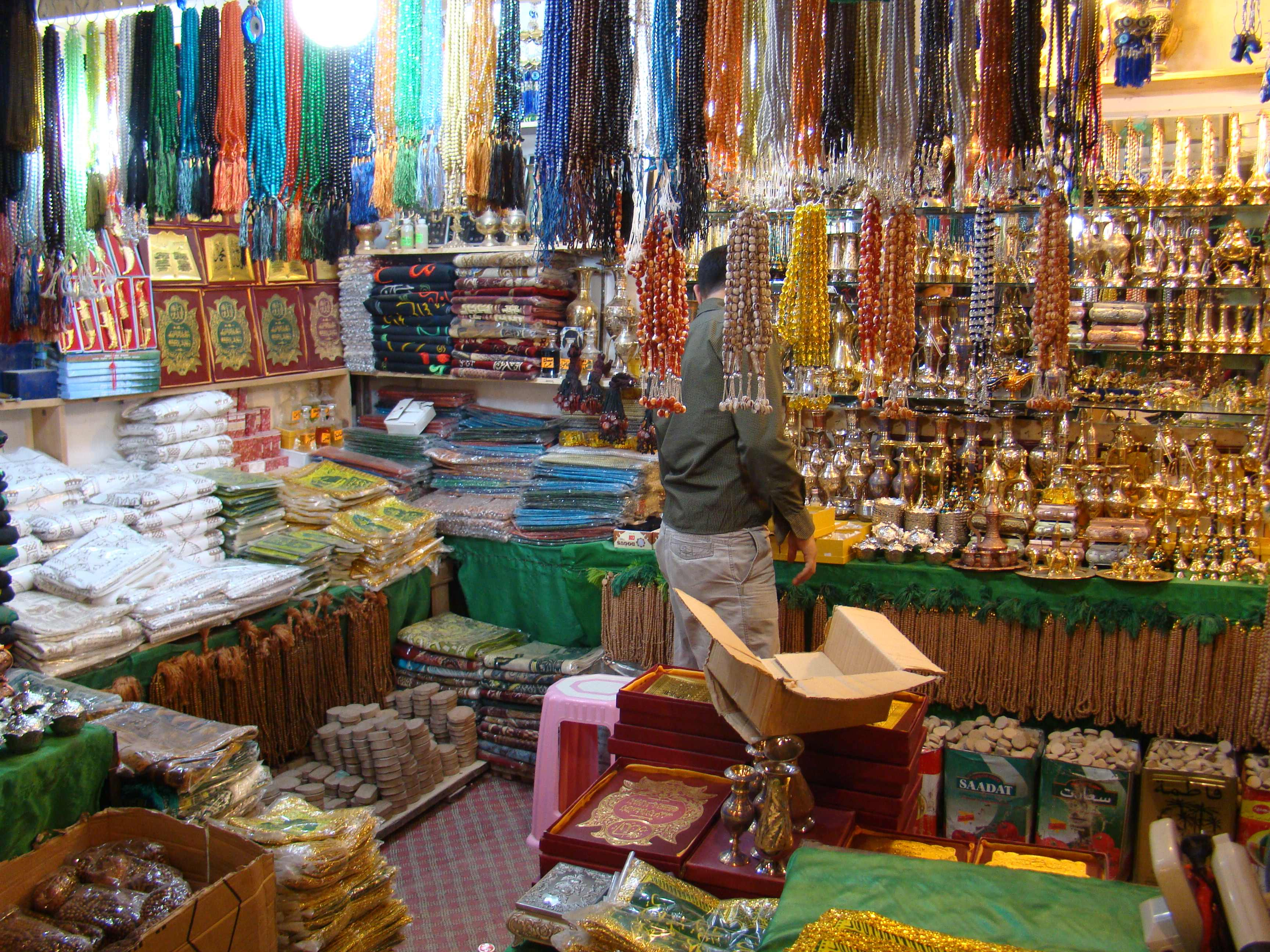 بازار كربلا